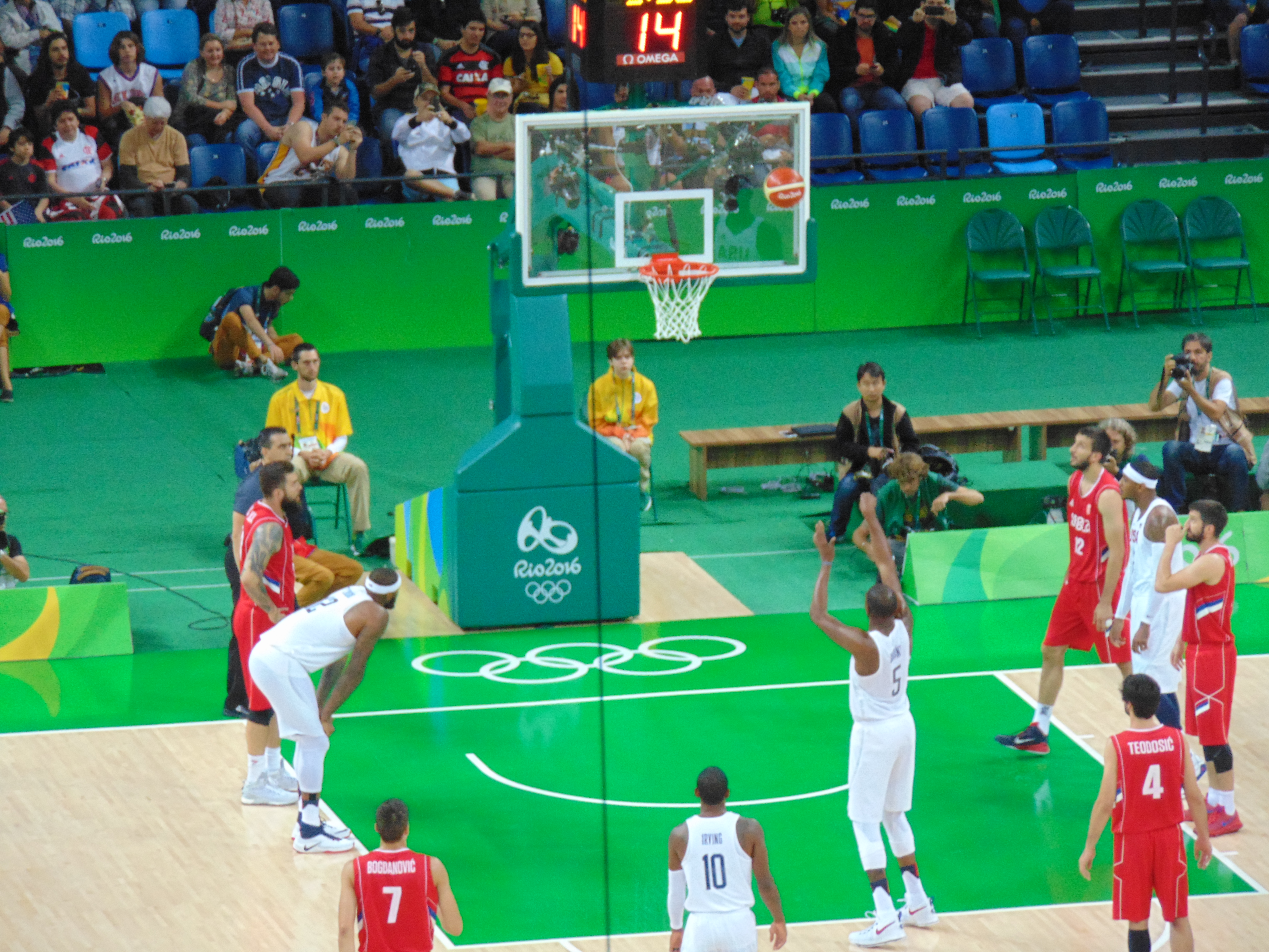 Rio 2016 - Men's basketball USA-SRB